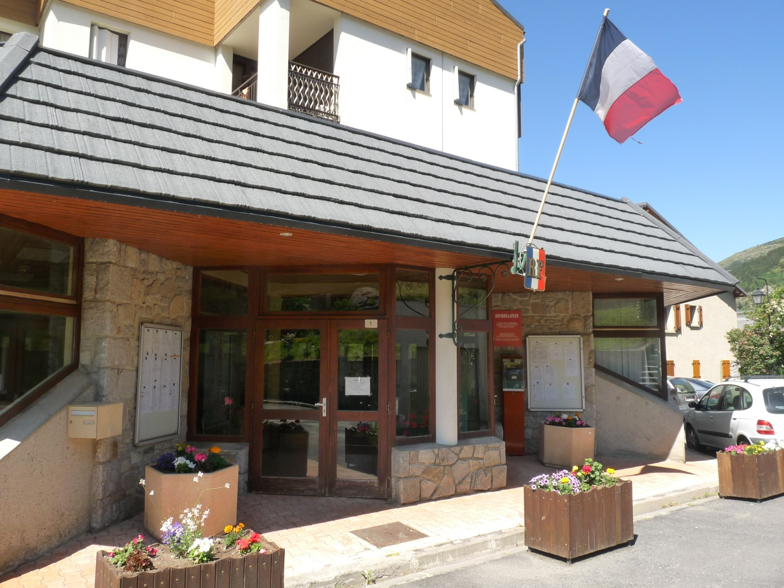 Mairie d'Egat, Pyrénées-Orientales, France